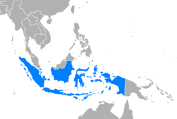 Idioma indonesio